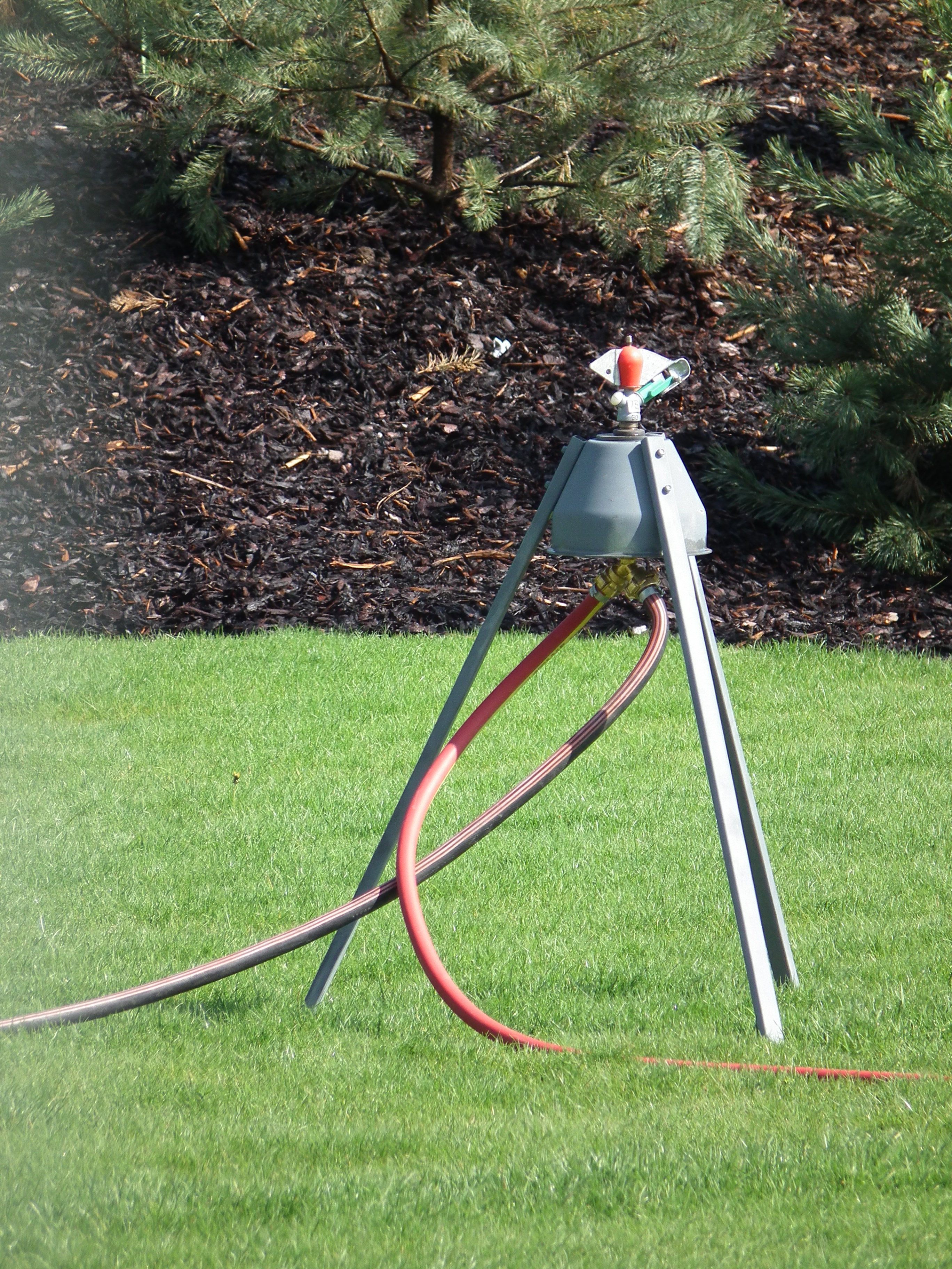 Rasensprenger, fotografiert im nördlichen Baden-Württemberg (Deutschland)